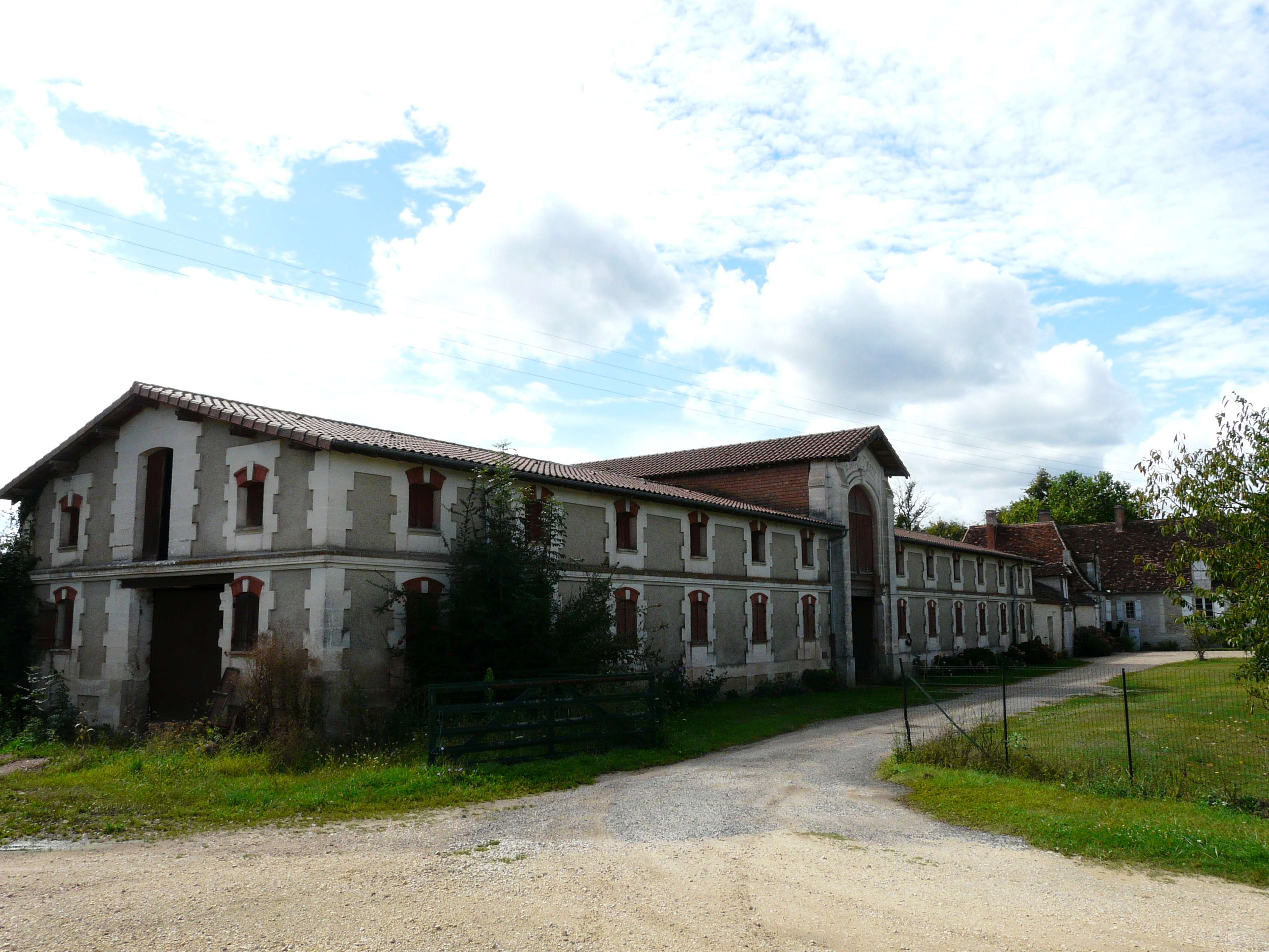 L'ancien chai attenant à la chartreuse de Taboury (qu'on voit au fond), Sainte-Marie-de-Chignac, Dordogne, France.